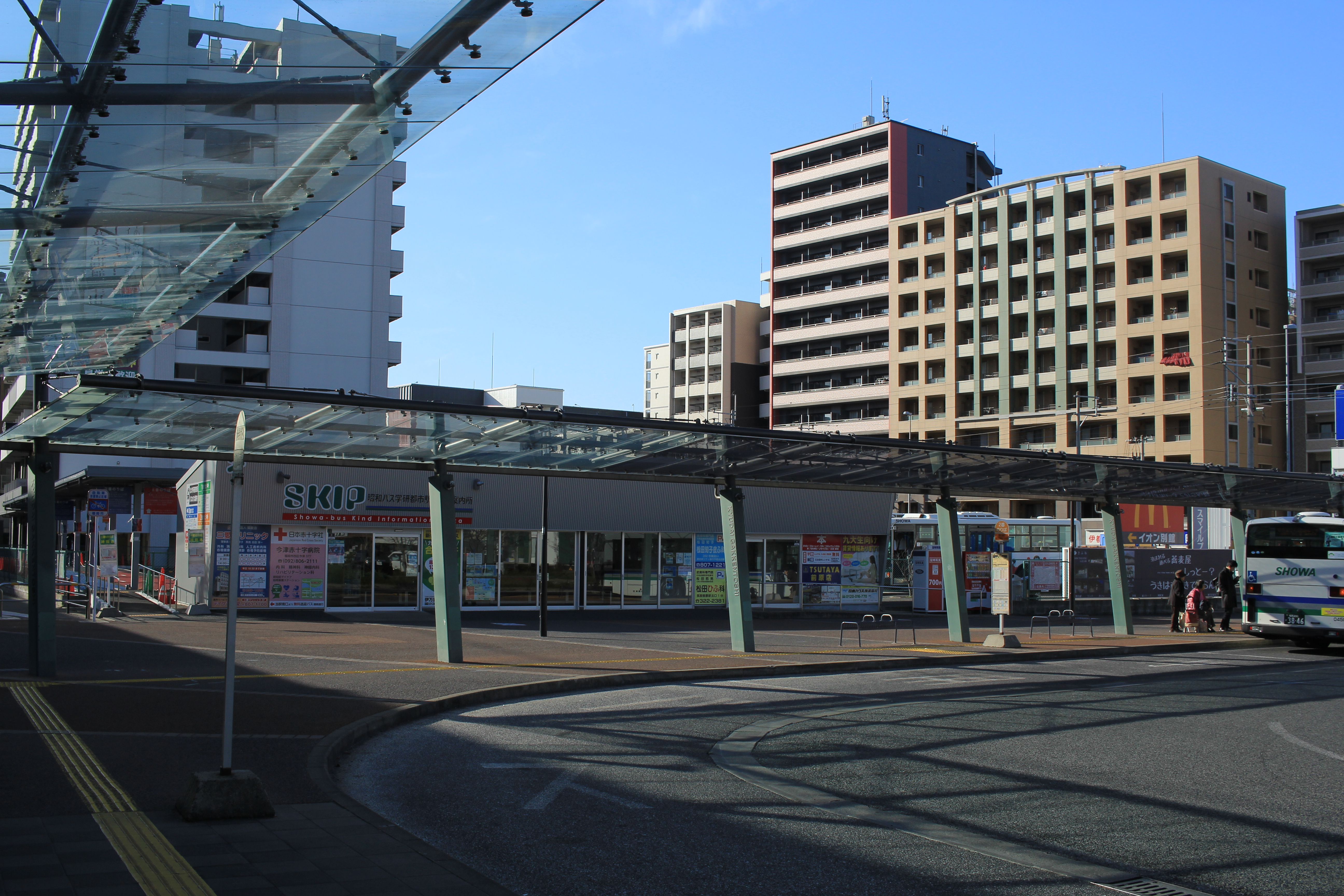 九大学研都市駅北口ロータリーとバス停 Canon EOS 60D